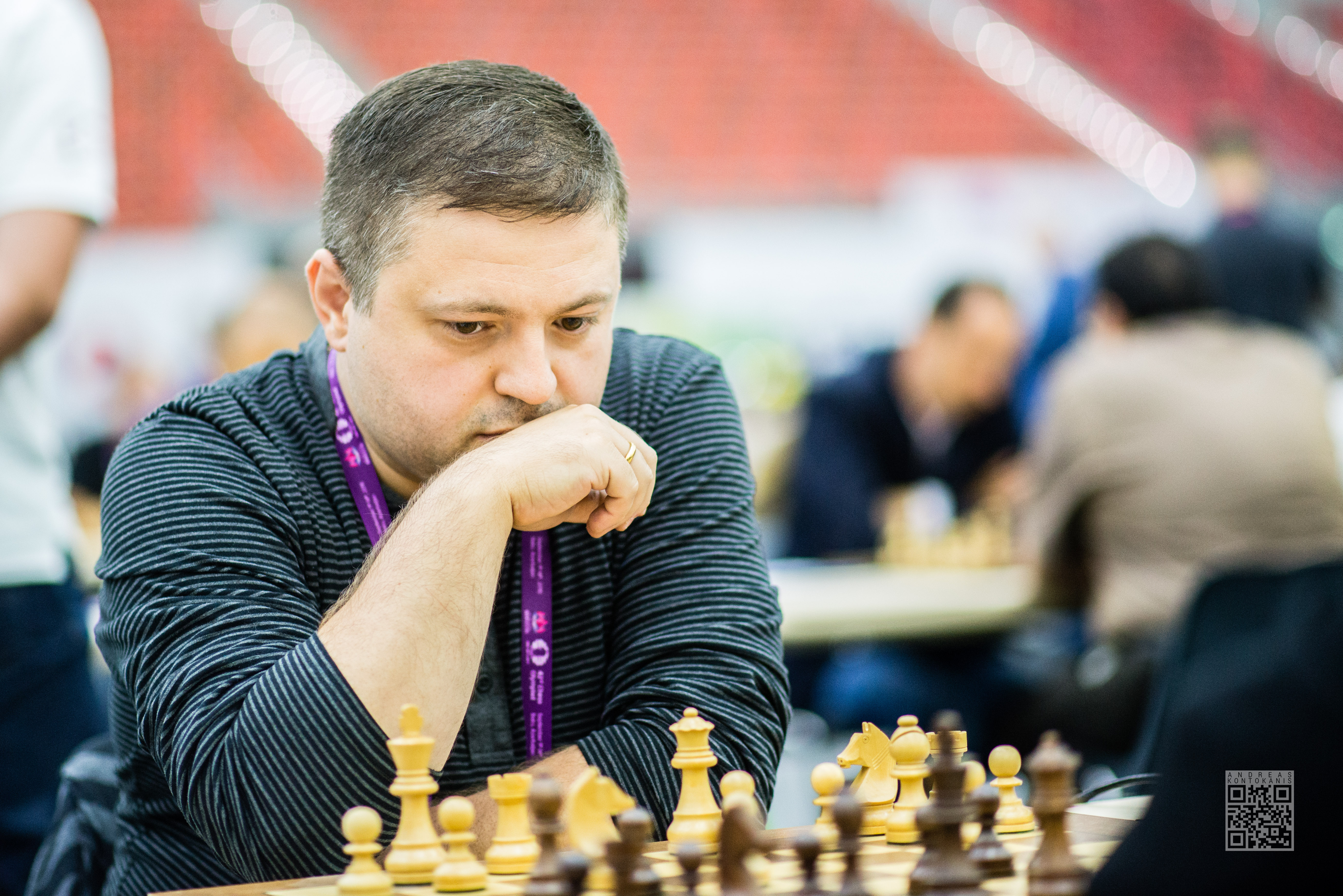 Gelashvili Tamaz